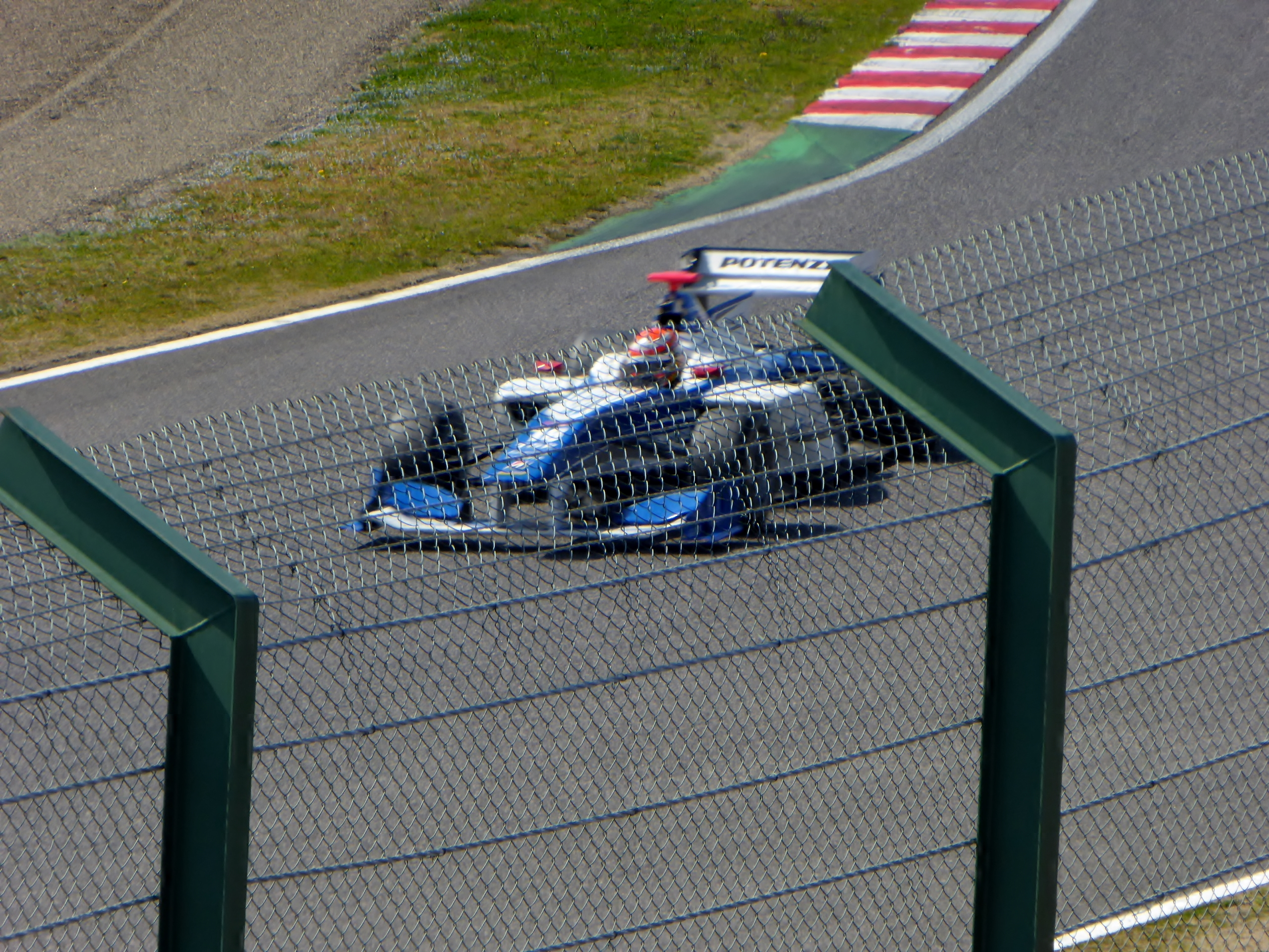 18号車KCモータースポーツグループSF14を撮影。